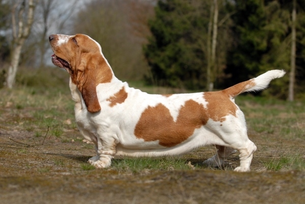 Basset Hound Categorie:Afbeelding hond